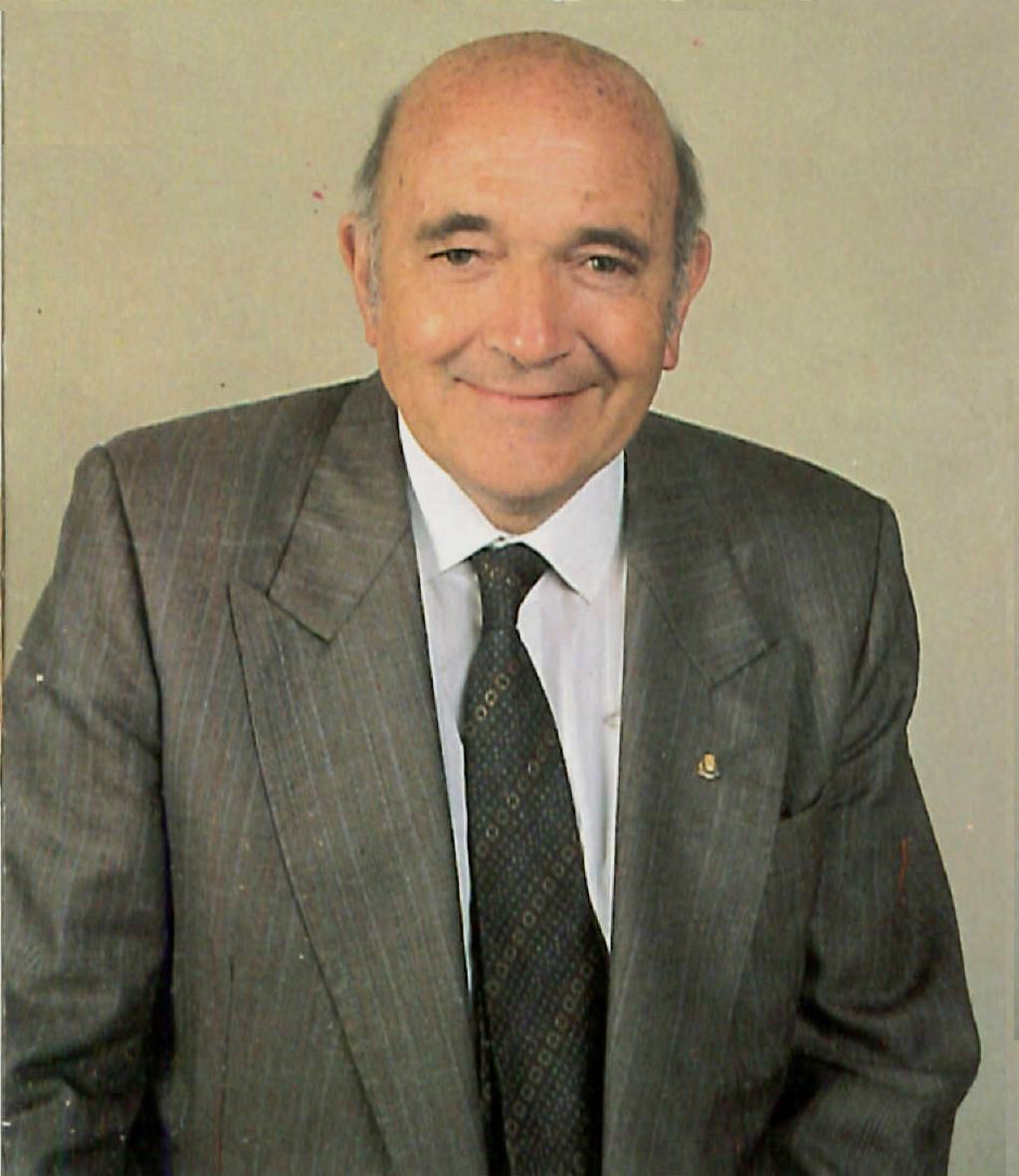 Calendario donde aparece Sergio Diez Senador" en el marco de la campaña electoral 1991."